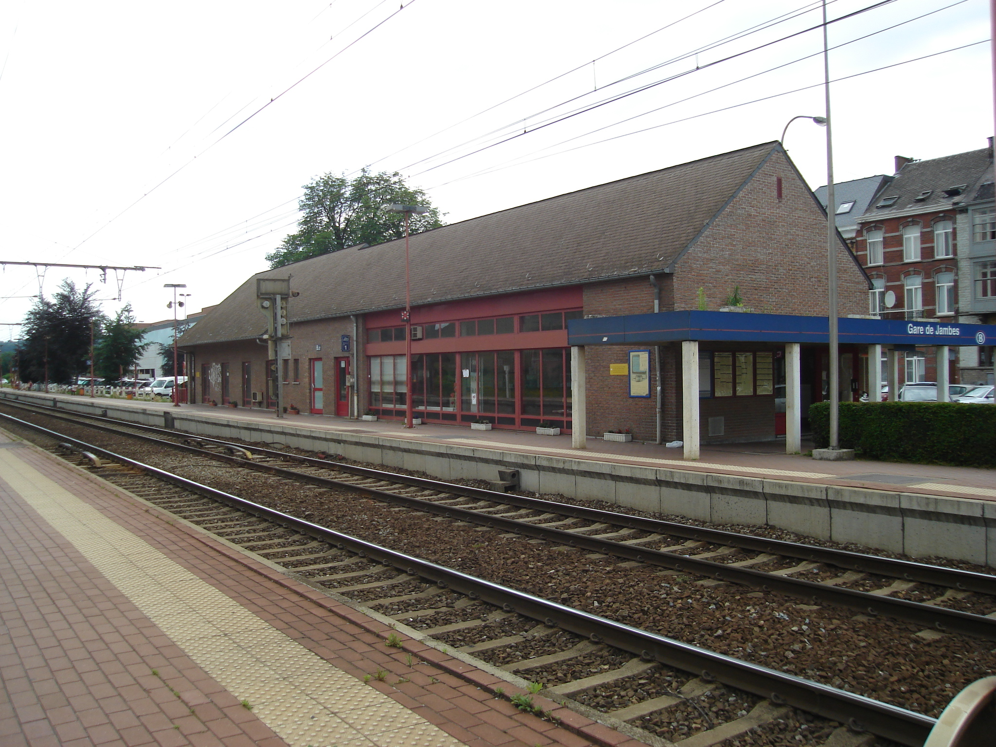 Gare de Jambes (Namur), sur la ligne SNCB 154 Namur-Dinant.